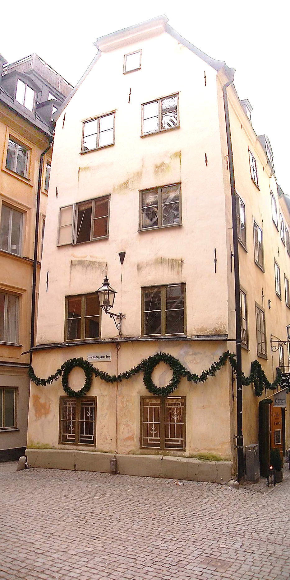 Sven Vintappares Torg. Gamla stan, Stockholm.